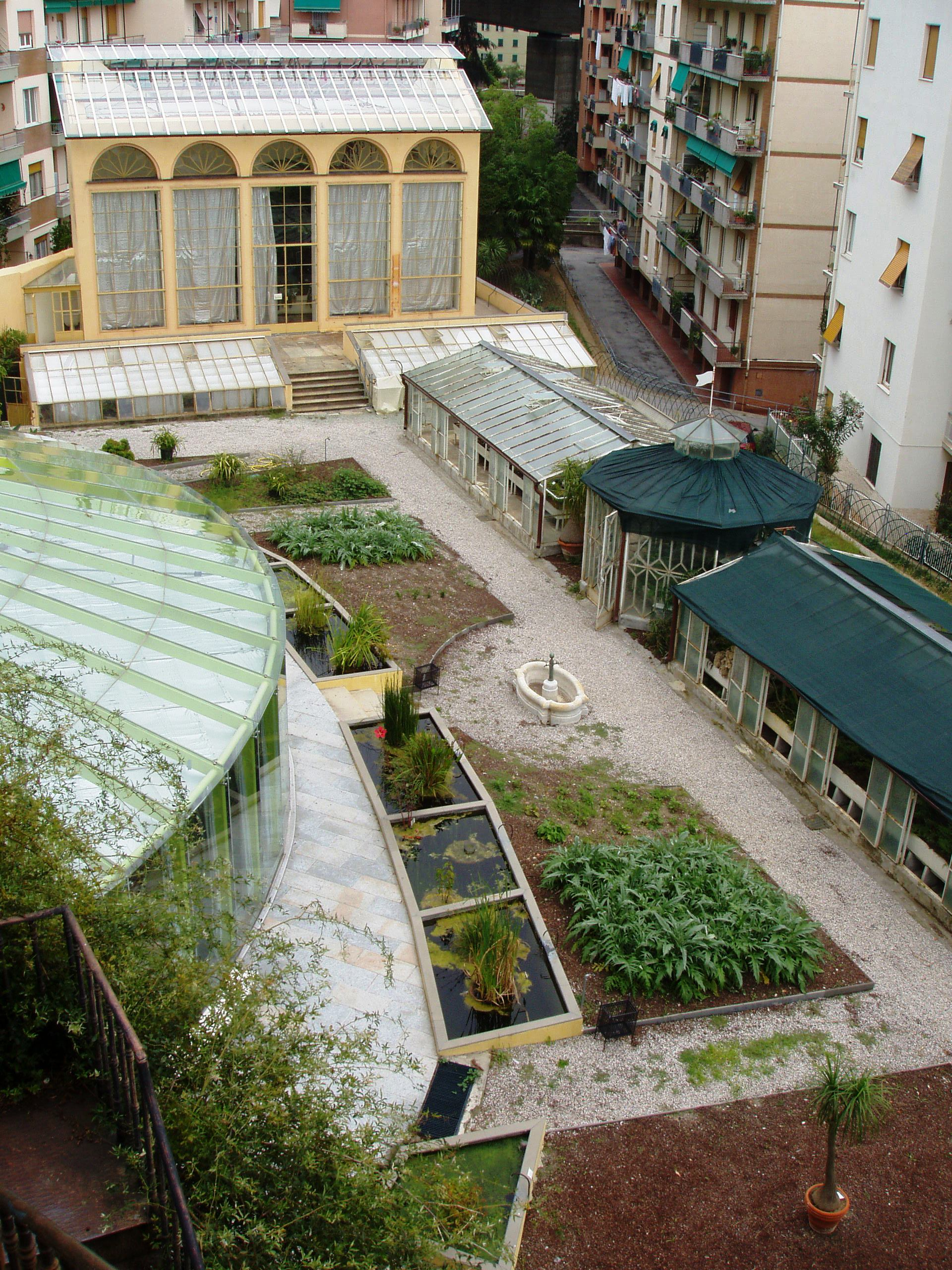 Giardino Botanico Clelia Durazzo Grimaldi - glass houses. Pegli (Genoa), Italy.